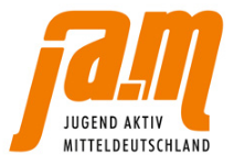 Logo von Jugend Aktiv Mitteldeutschland